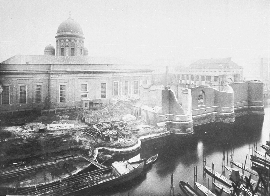 Berliner Dom von der Spreeseite mit Campo Santo und alten Fundamenten des Stüler-Entwurfs.